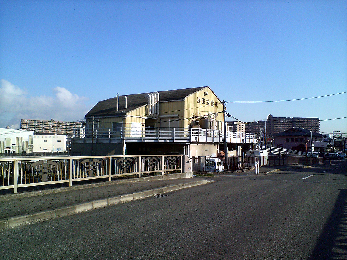 投稿者自身が『浅田給食株式会社 忠岡工場』 （大阪府泉北郡忠岡町高月北1丁目4-9）を撮影。